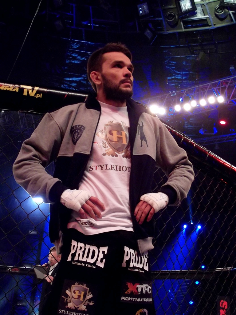 Zdjęcie zrobione podczas gali mieszanych sztuk walki MMA Attack 2 w katowickim Spodku.